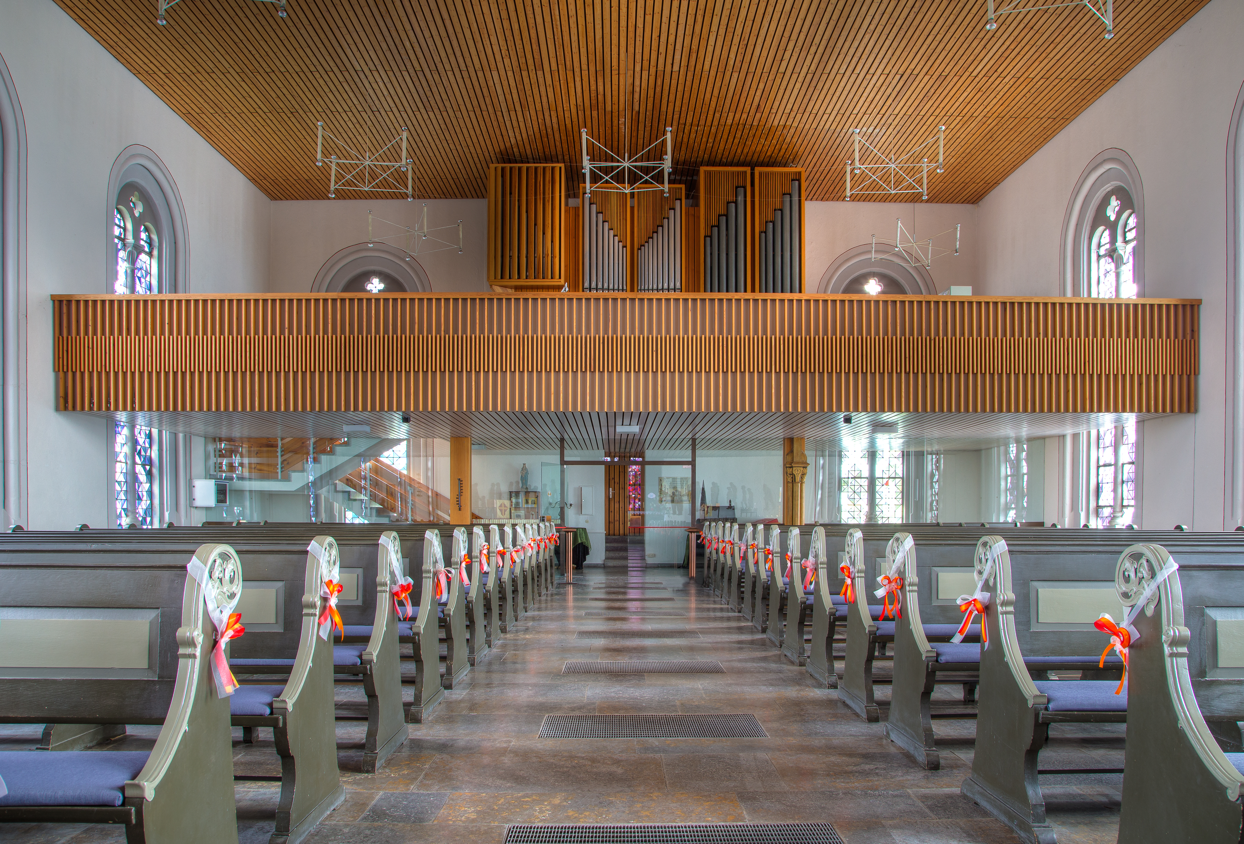 Evangelische Stadtkirche Grünberg, Landkreis Gießen in Hessen, Deutschland